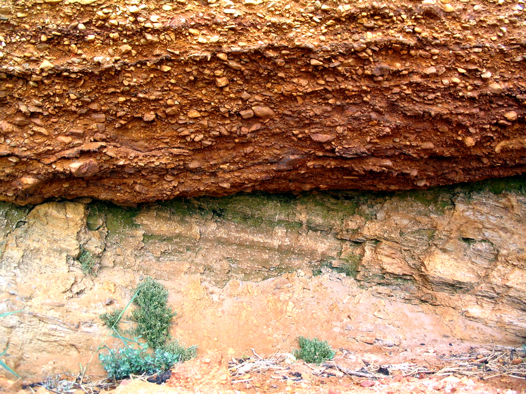 Falaise de Pénestin, embouchure de la Vilaine, Bretagne, F. Discordance entre le micaschiste (dessous) et le niveau de dépôt du paléofleuve (cailloutis)